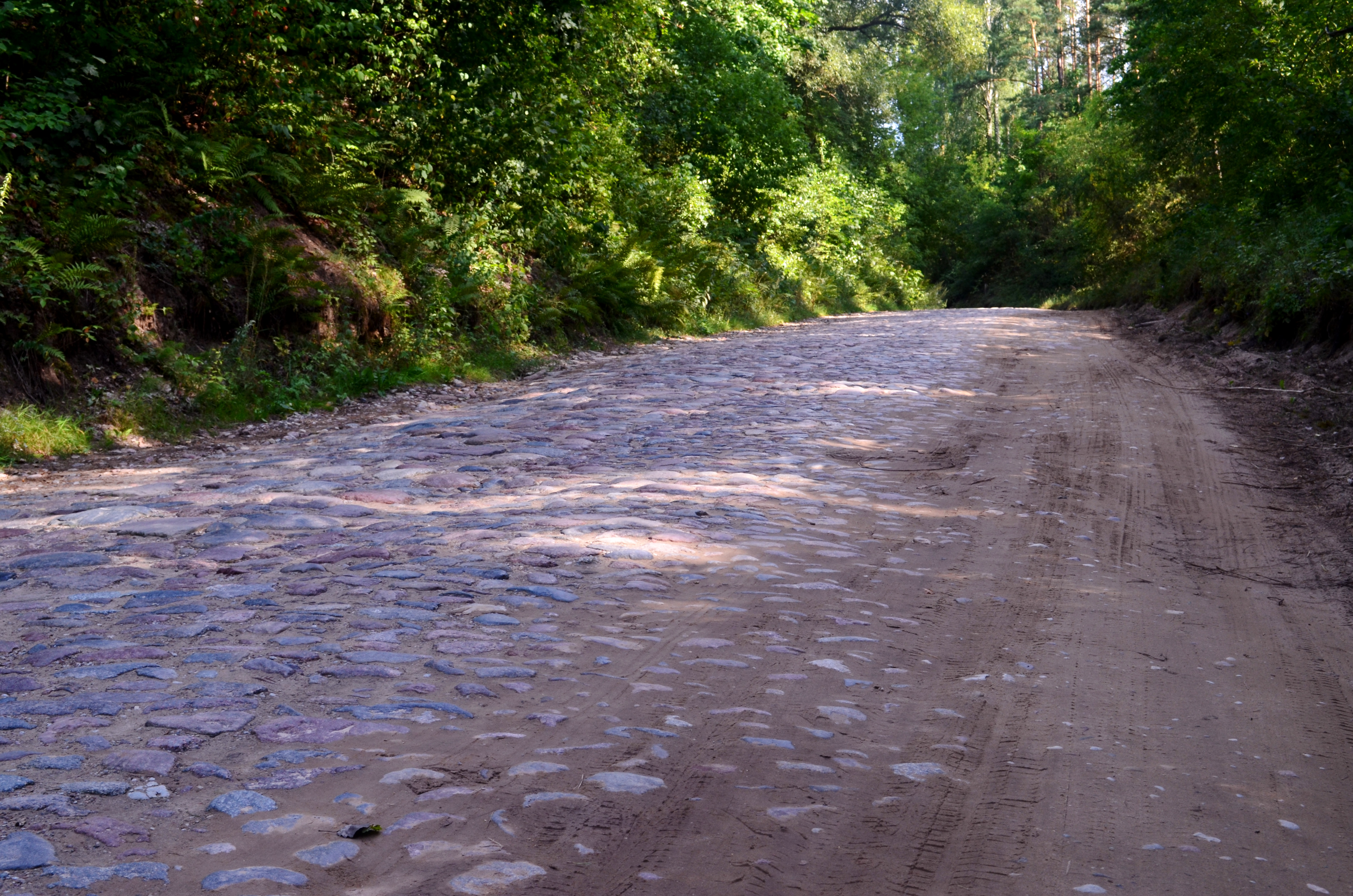 Grindinys, vedantis Straujos slėnin, Zakavoliai, Varėnos raj.